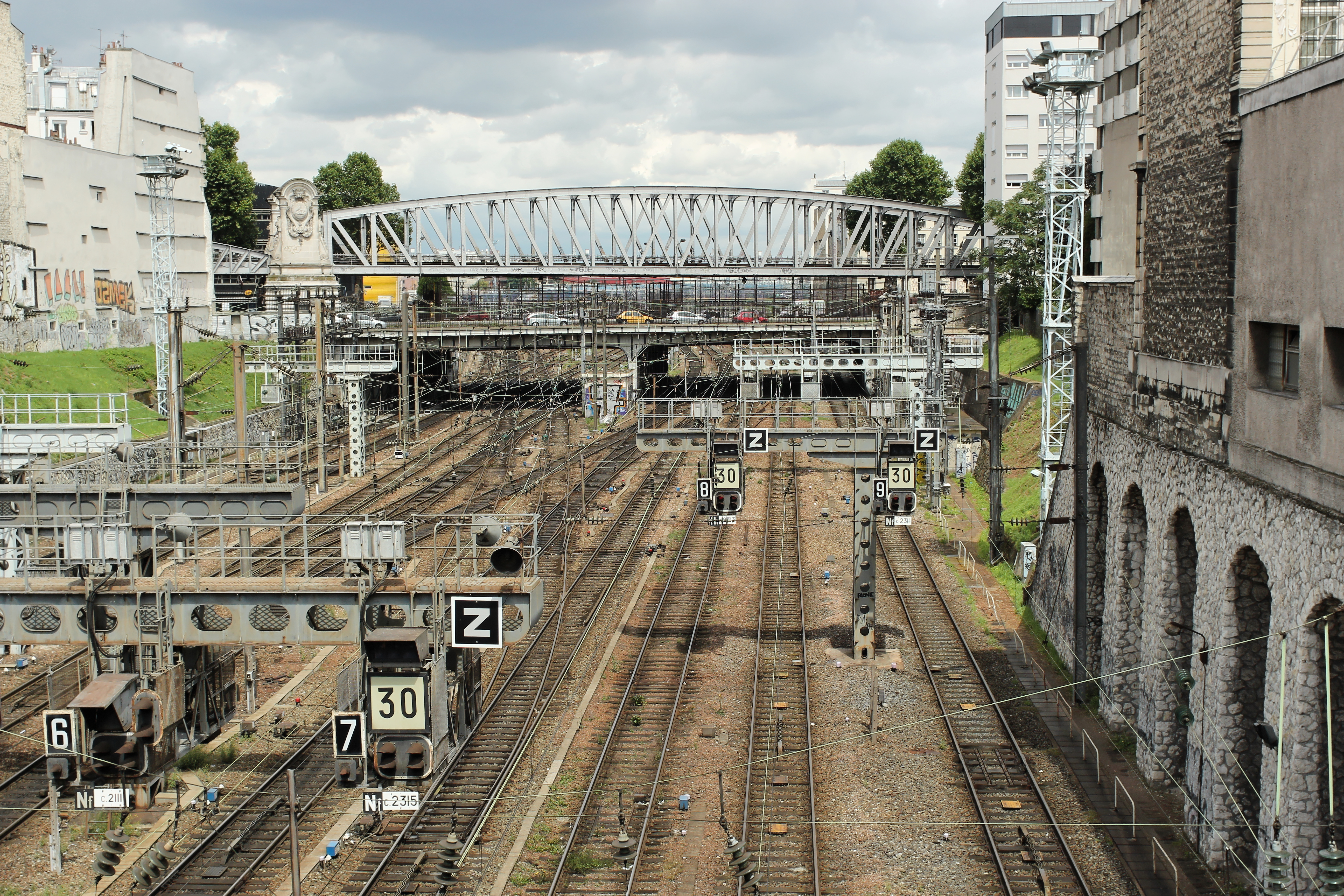 Voies de la gare de l'Est, depuis la place T/10 (Paris).